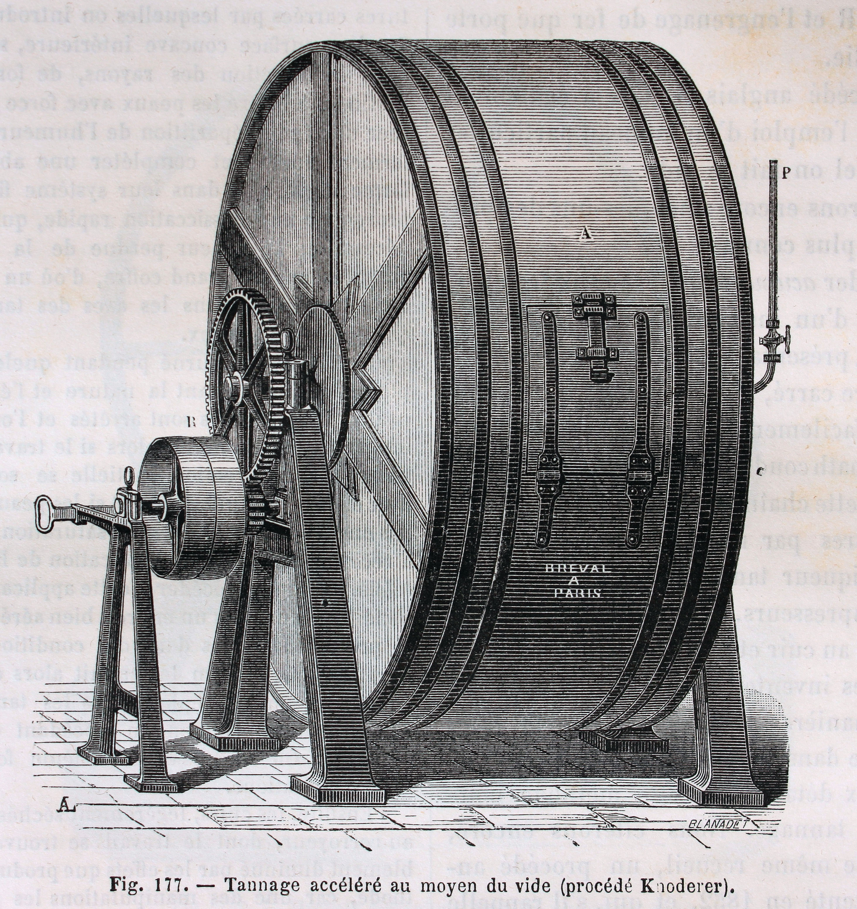 Ilustraciones de la obra : Les merveilles de l'industrie ou, Description des principales industries modernes / par Louis Figuier. - Paris : Furne, Jouvet, [1873-1877]. - Tome II